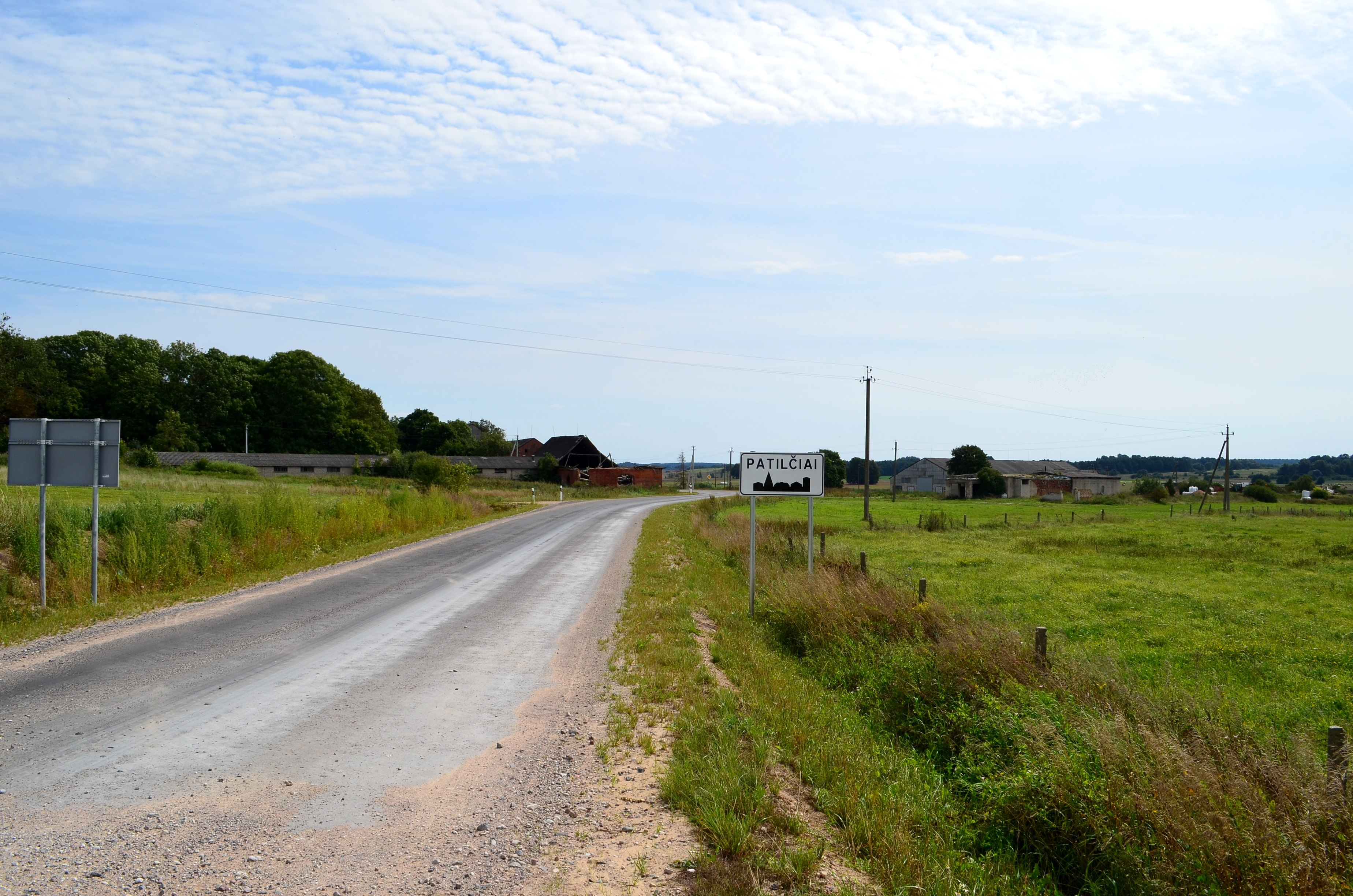 Patilčiai, Vilkaviškio raj.